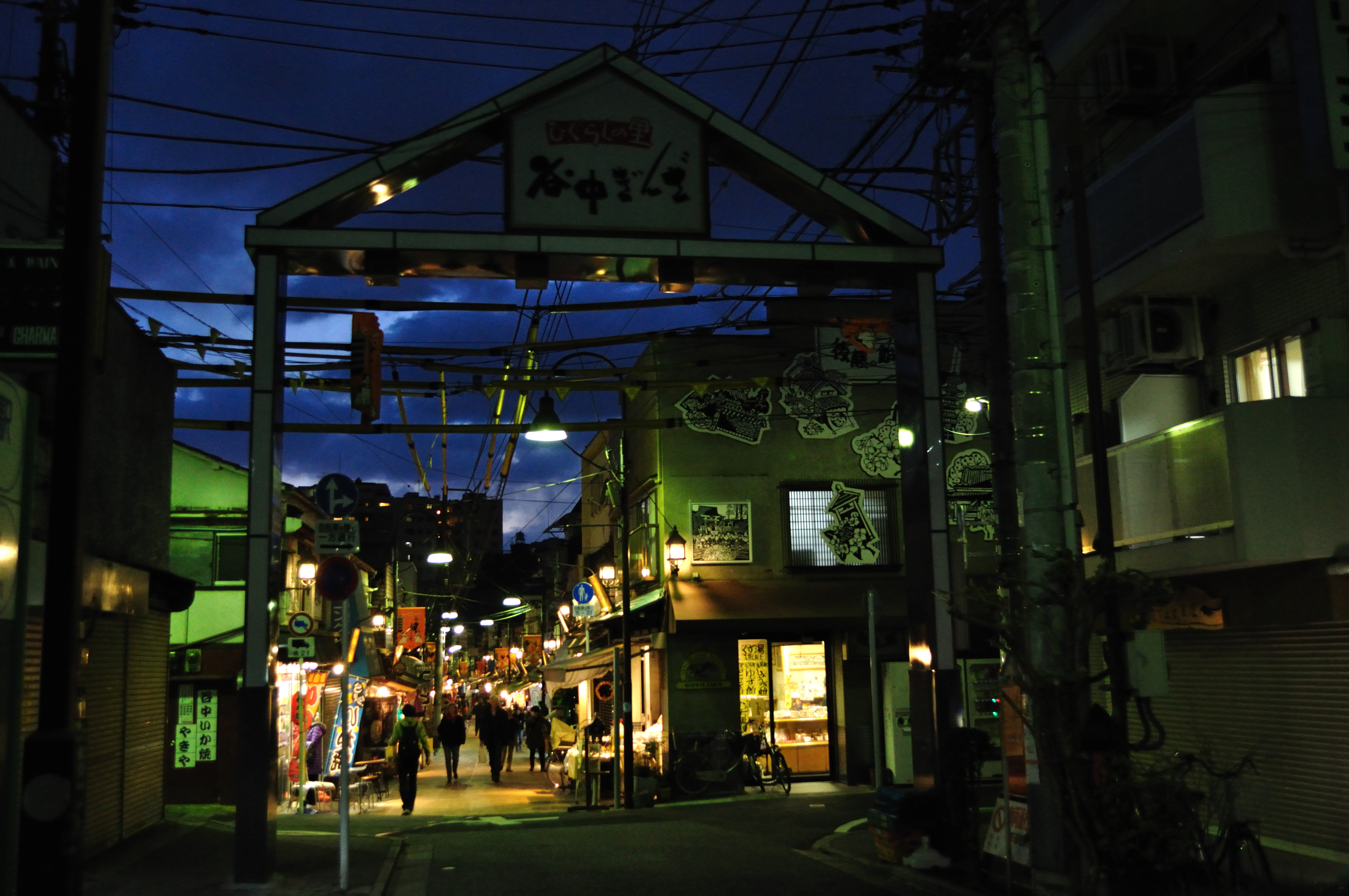 夕暮れ時の谷中銀座（東京都台東区）